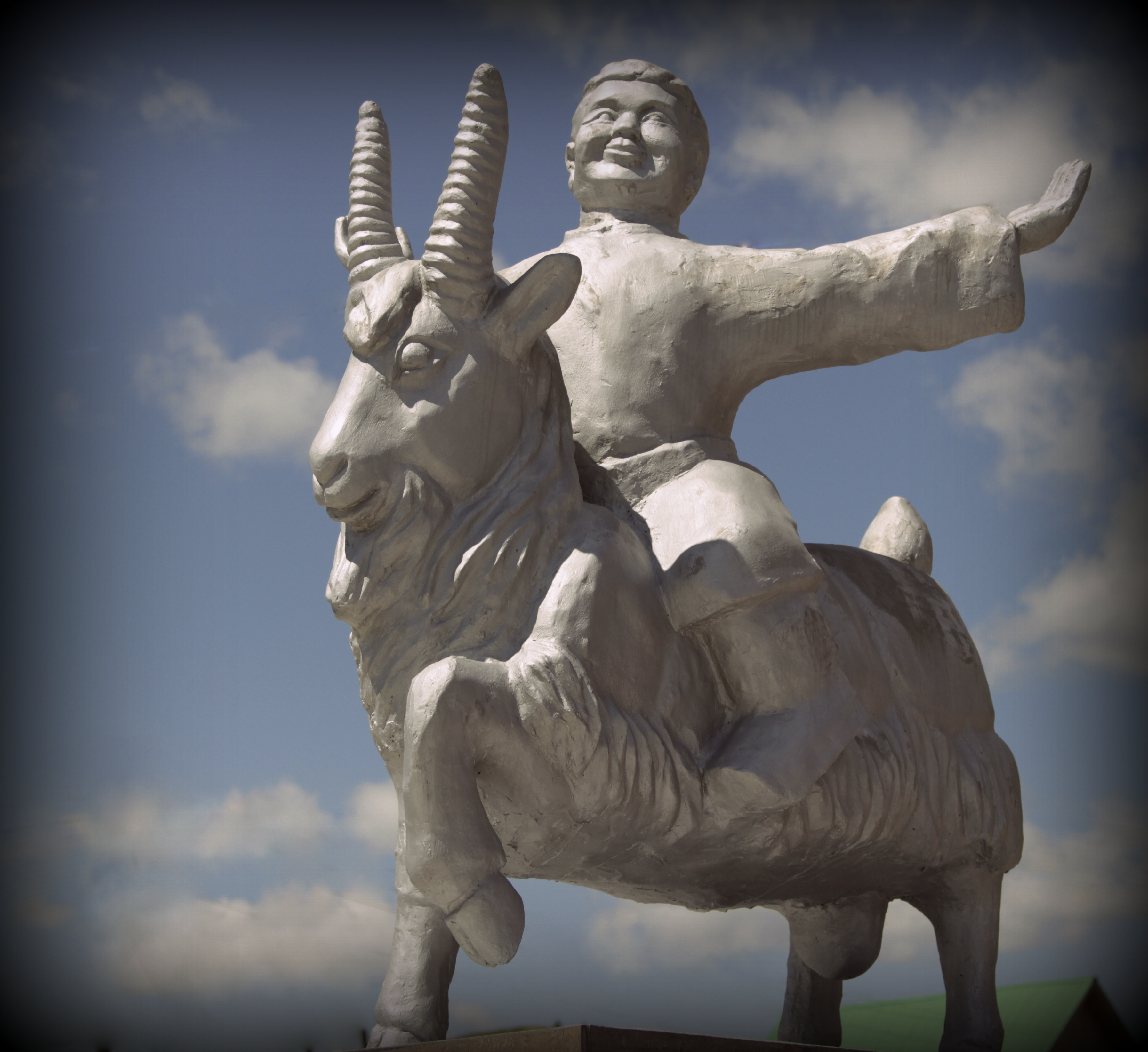 Скульптура "Будамшу" - изображение бурятского народного персонажа на козле - установлена в 2008 году перед культурно-концертным центром "Амар Сайн" в поселке Агинское Забайкальского края. Скульптор - народный художник Бурятии Геннадий Васильев.